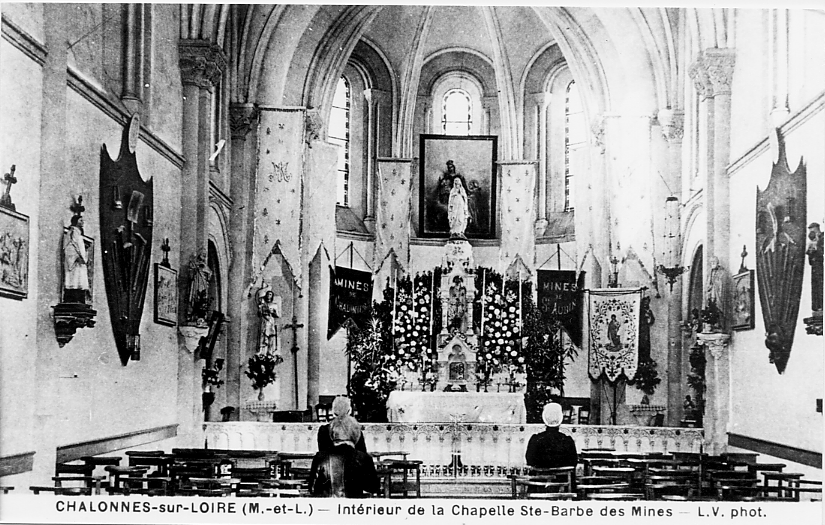 Cette photo montre l'intérieur de la Sainte-Barbe-des-Mines (Chalonnes-sur-Loire, Maine-et-Loire, France) à la fin du XIXe siècle.